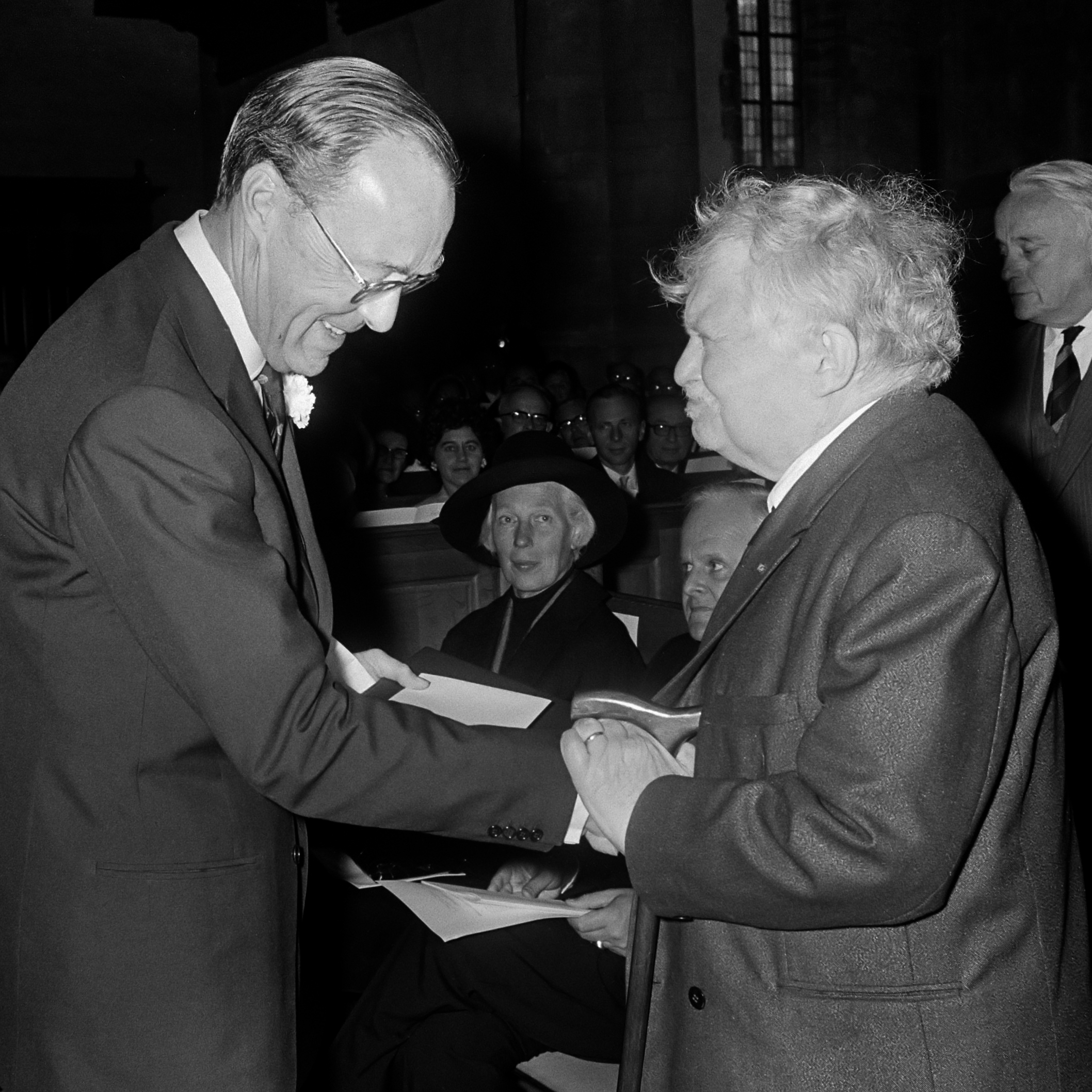 Prins Bernhard schudt de hand van de Franse filosoof Gabriel Marcel 27 oktober 1969